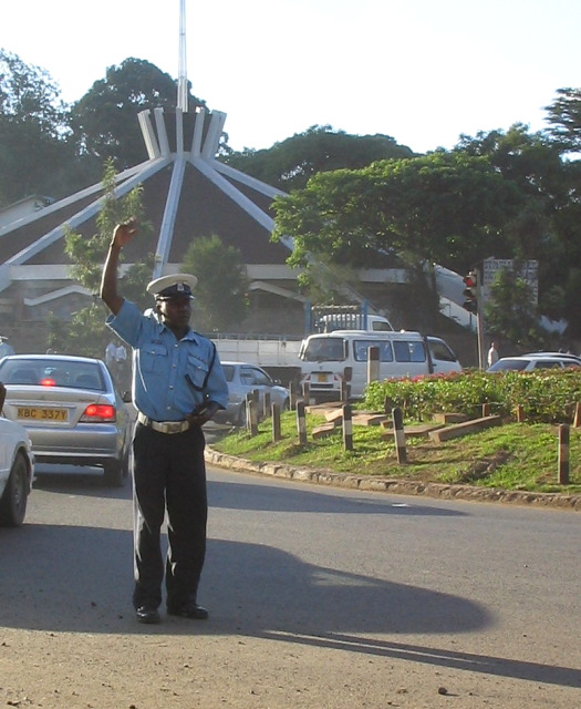 En polisman vinkar fram bilar mot rött ljus i en rondell, för att försöka lösa en trafikpropp. Bilden tagen på Uhuru Highway i Nairobi 2008.